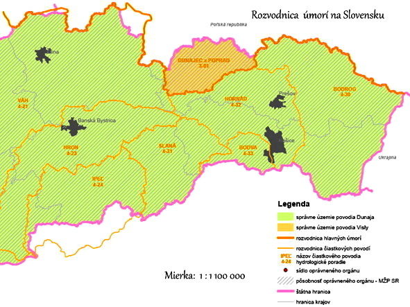 Detail. Mapa Rozvodnica úmorí na Slovensku.